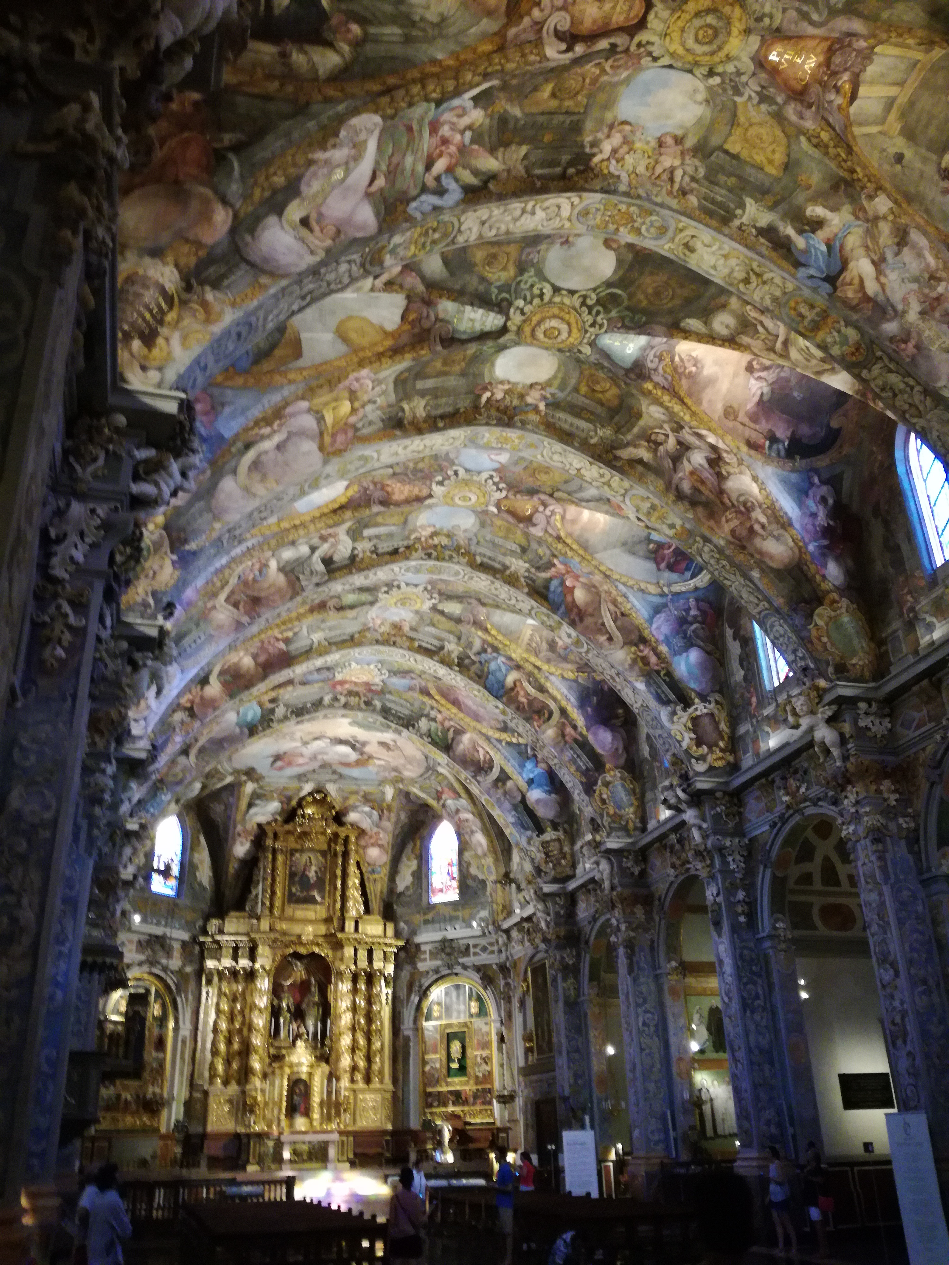 Chiesa di San Nicola di Bari e San Pietro Martire